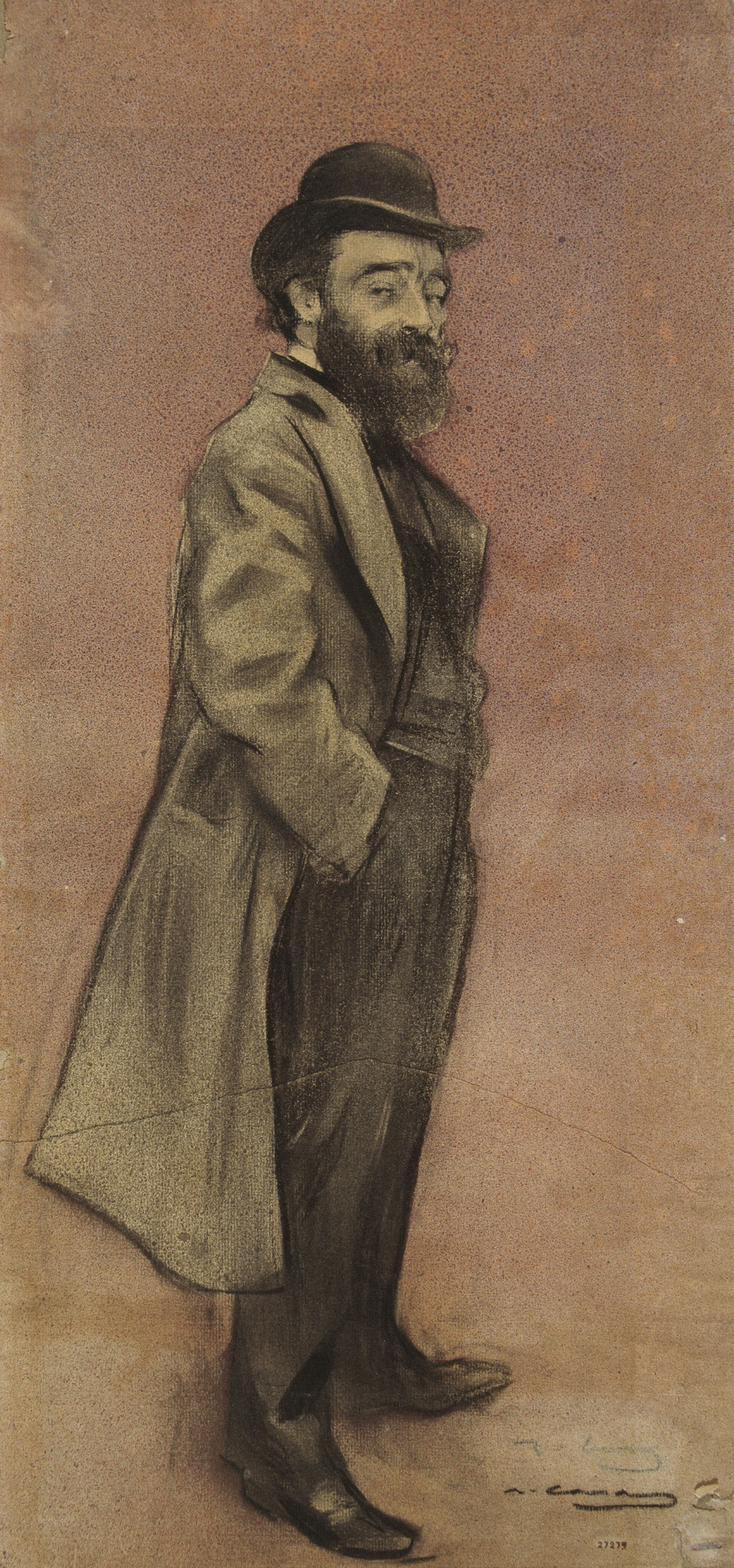 Portrait of Eliseu Meifrèn